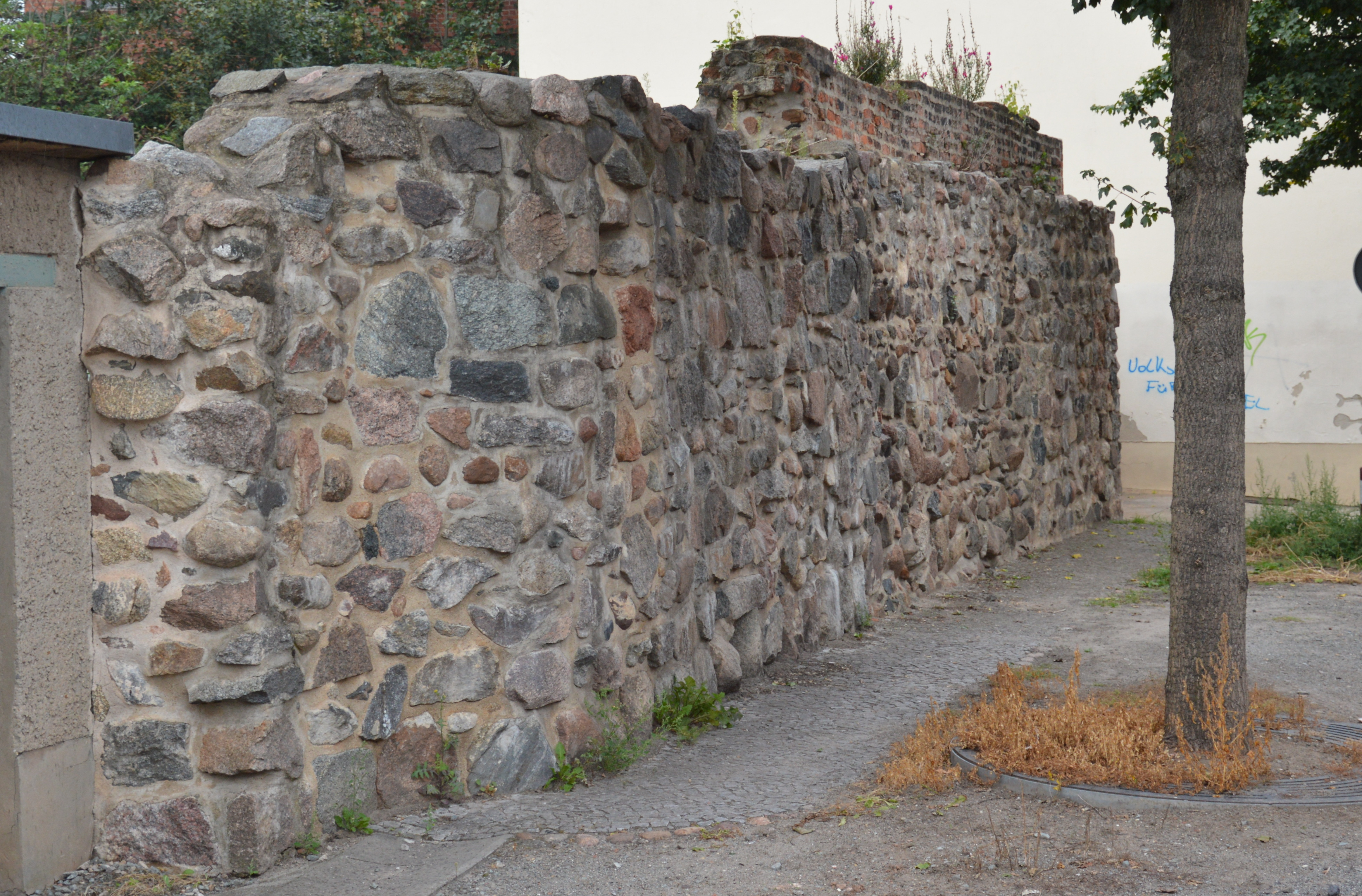 Stadtmauer in der Bethanienstraße in Burg